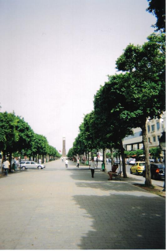 Bourguiba Avenue in Tunis (Tunisia)